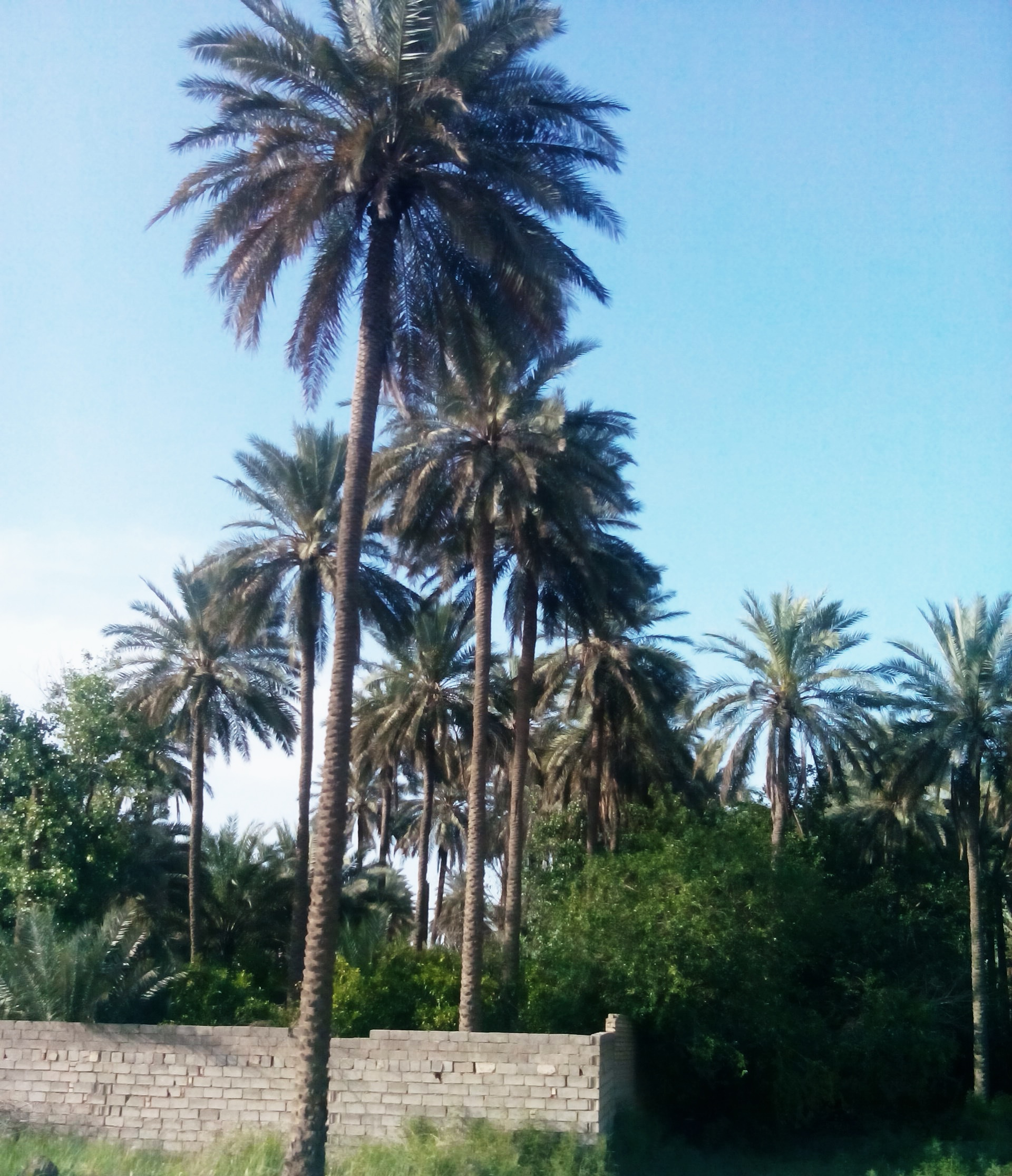 بستان نخيل في ناحية المحمودية (الأسود) في مدينة الخالص شرق العراق